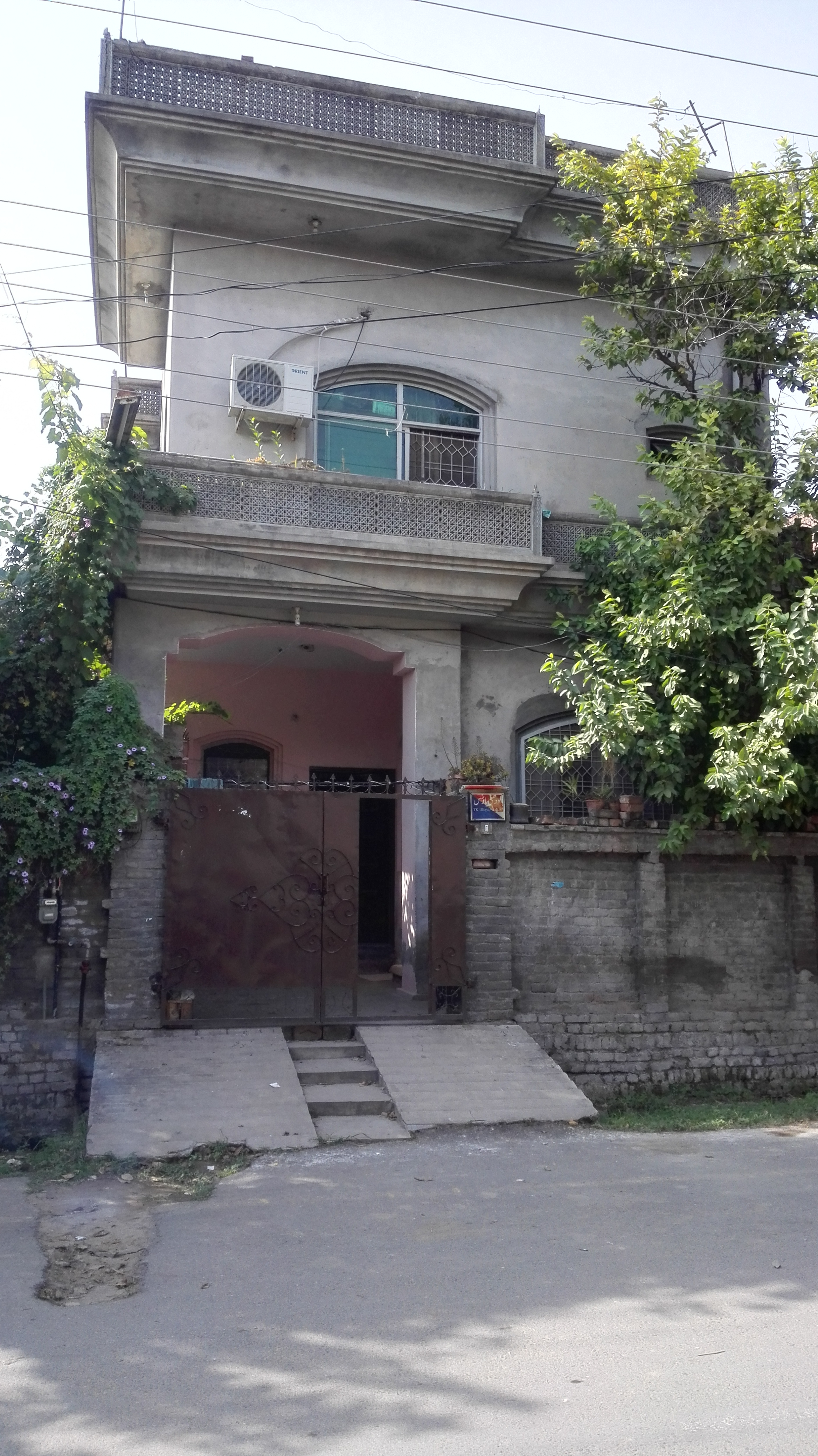 Sadar Bazar, Sialkot, Pakistan